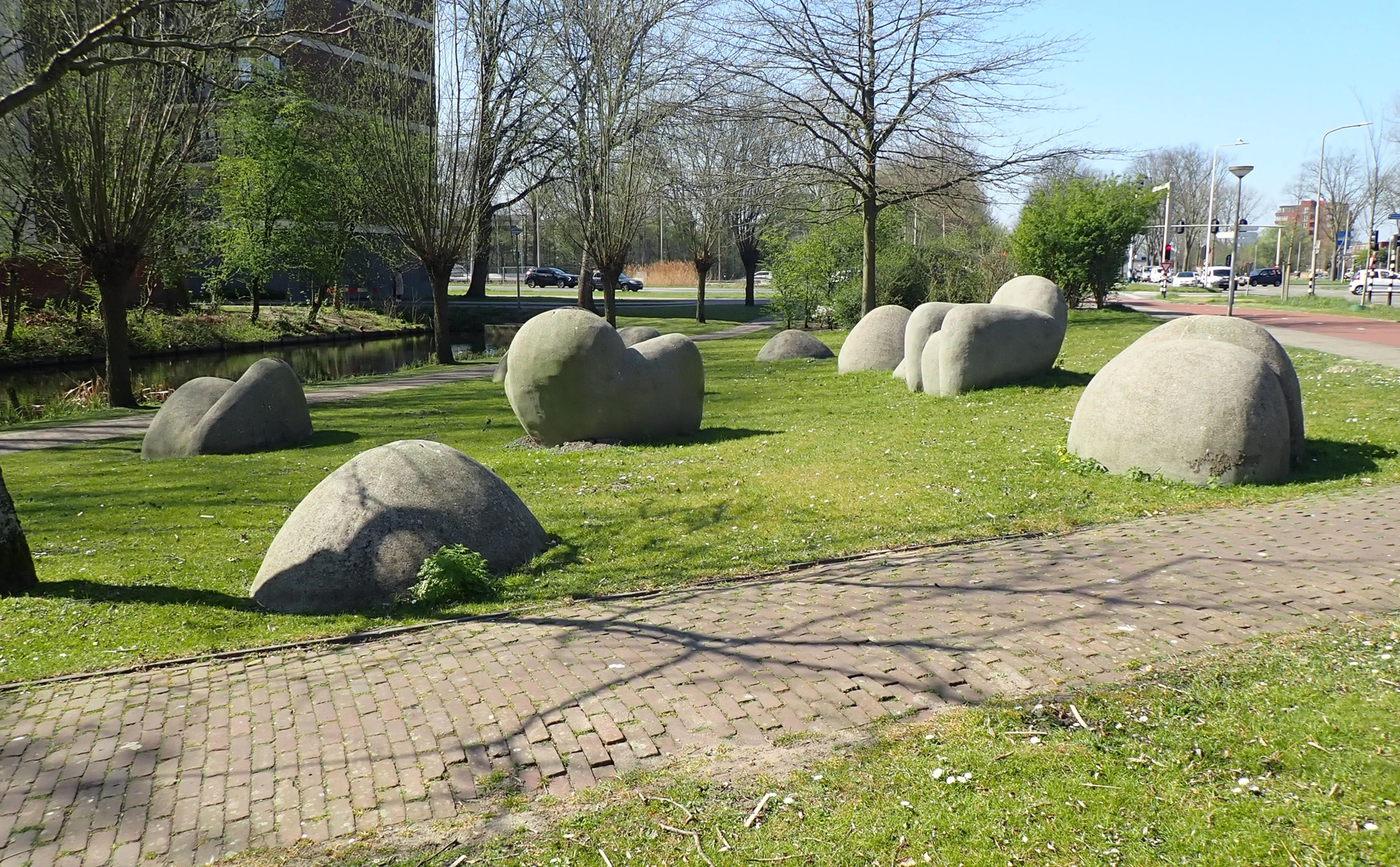 Delft, Westlandseweg, bij tankstation. Kunstwerk "Stoelen" van Jan Neggers. The Netherlands. The photographical reproduction of this work is covered under the article 18 of the Dutch copyright law, which states that “it is not an infringement of copyright to reproduce and publish pictures of a work, as meant in article 10, first paragraph, under 6°[1] or of an architectural work as meant in article 10, first paragraph, under 8°[2], which are made to be permanently located in a public place, as long as the work is depicted as it is located in the public space. Where incorporation of a work in a compilation is concerned, not more than a few of the works of the same author may be included”. [1] drawings, paintings, works of architecture and sculpture, lithographs, engravings and the likes [2] drafts, sketches and three-dimensional works relating to architecture, geography, topography or other sciences Note that photographs are not included in Item 6. They are separately listed at Item 9 and are therefore not covered by FOP. See COM:CRT/Netherlands#Freedom of panorama for more information. .